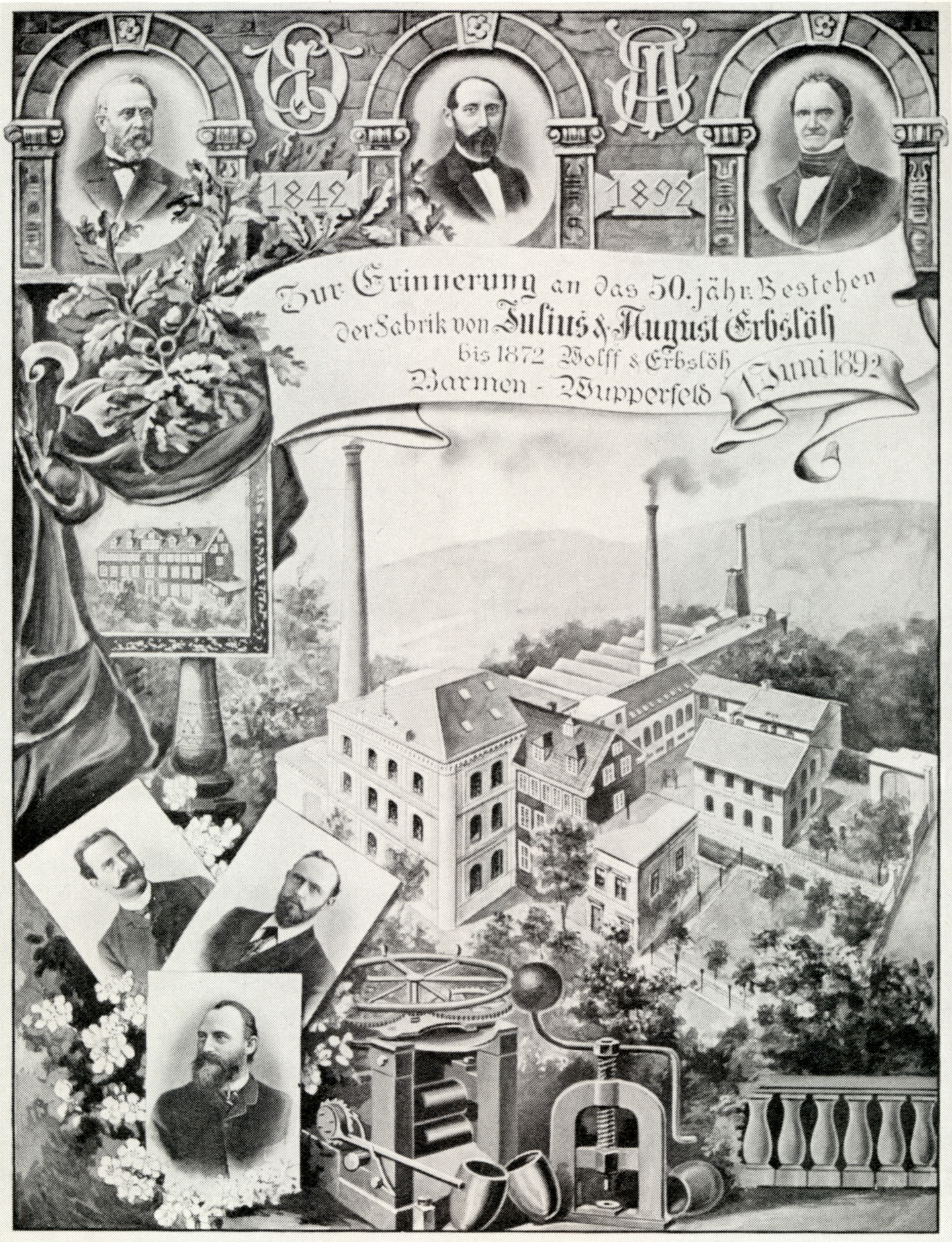 Gedenkblatt der Metallwalzwerke Julius & August Erbslöh, Barmen (heute: Wuppertal) zum 50-jährigen Bestehen der Firma. Das Blatt zeigt neben den Fabrikanlagen die Gründergeneration sowie die Teilhaber der 2. Generation